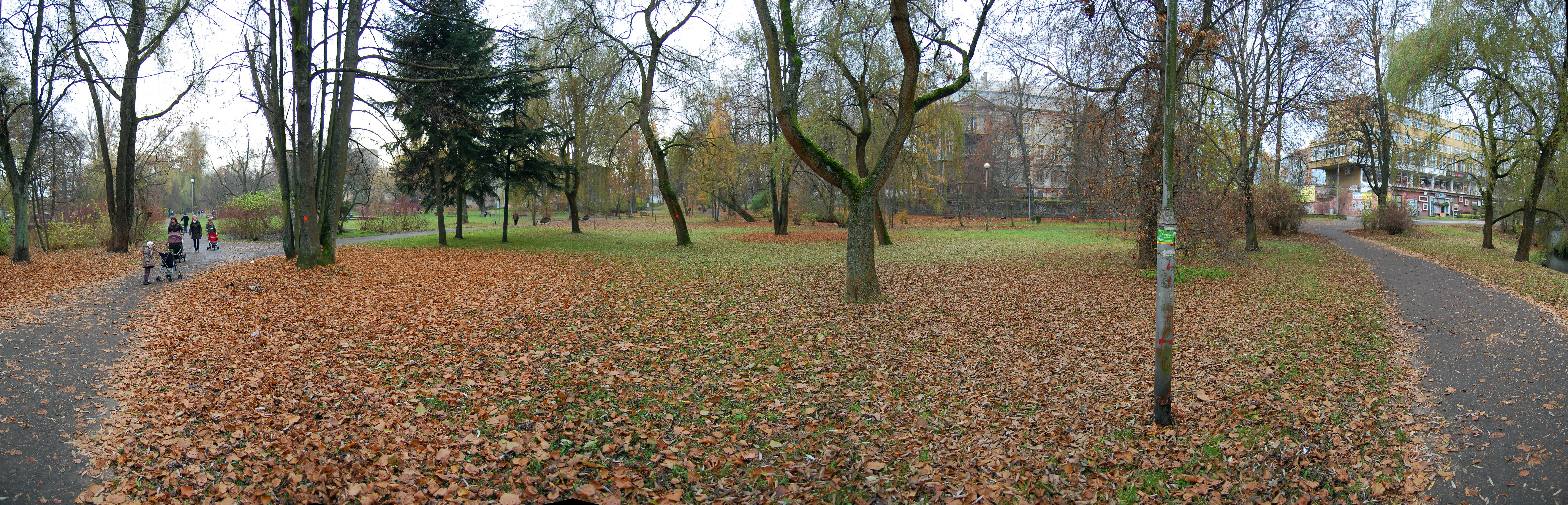 Zdjęcie panoramiczne z 2011 roku - Park Książąt Pomorskich w Koszalinie